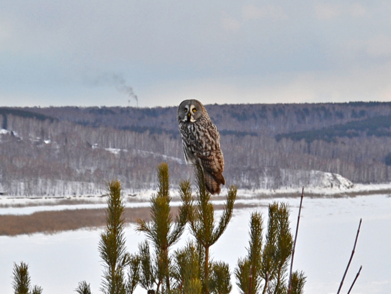 Бородатая неясыть в Лагерном саду, занесена в Красную книгу Томской Области (3 категория).